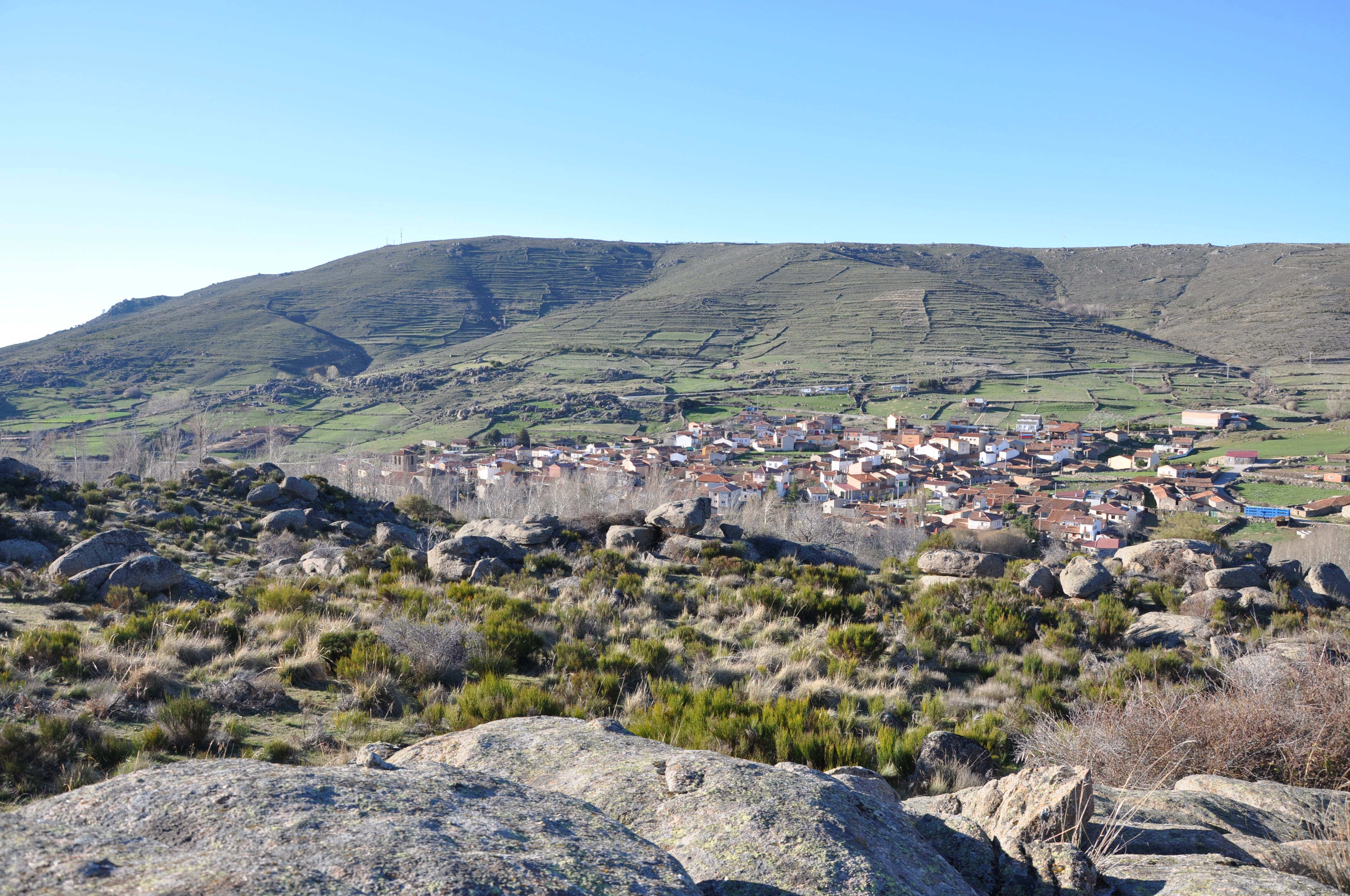 Panorámica de Riofrío, Ávila, España. Al fondo la Sierra de Yemas.